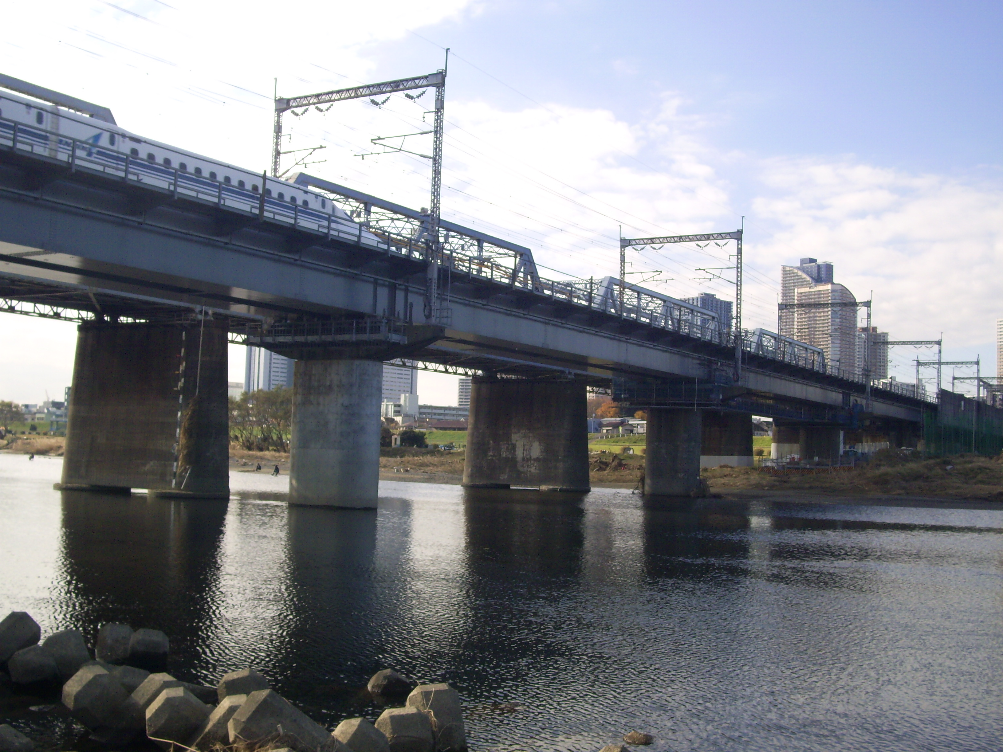 東海道新幹線多摩川橋梁、トラス橋と見間違えしやすいがトラス構造は横須賀線のもので新幹線側はプレートガーターである ㊟カメラを起動すると日付機能が出荷時のものに初期化されるため、ファイル履歴の投稿日時とメタデータの原画像データの生成日時が異なります（概要欄の日付が撮影日）